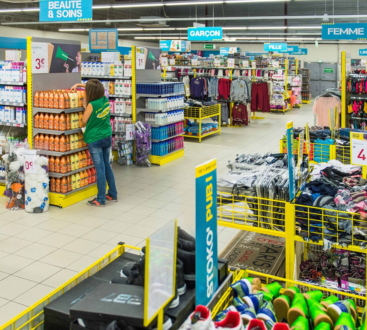 Intérieur d'un magasin de déstockage Stokomani